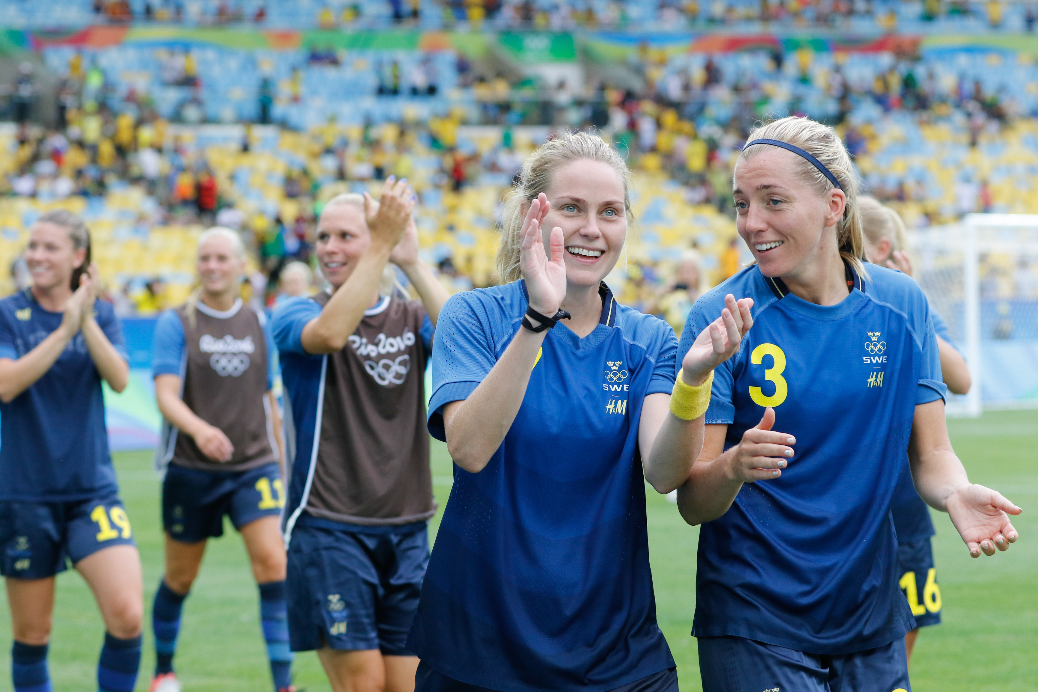 Rio de Janeiro - Seleção brasileira de futebol feminino disputa semifinal com a Suécia, no Maracanã. O Brasil perde nos pênaltis e vai disputar o bronze (Fernando Frazão/Agência Brasil)